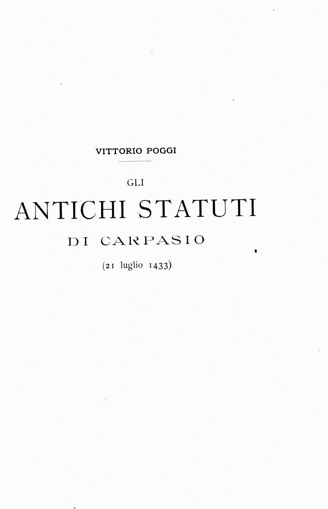 Frontespizio